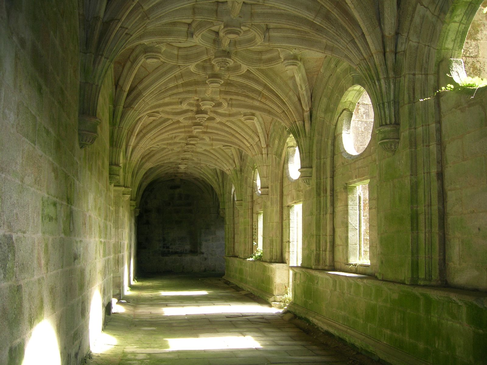 Galería oeste del Claustro Reglar con las bóvedas estrelladas del siglo XVI.